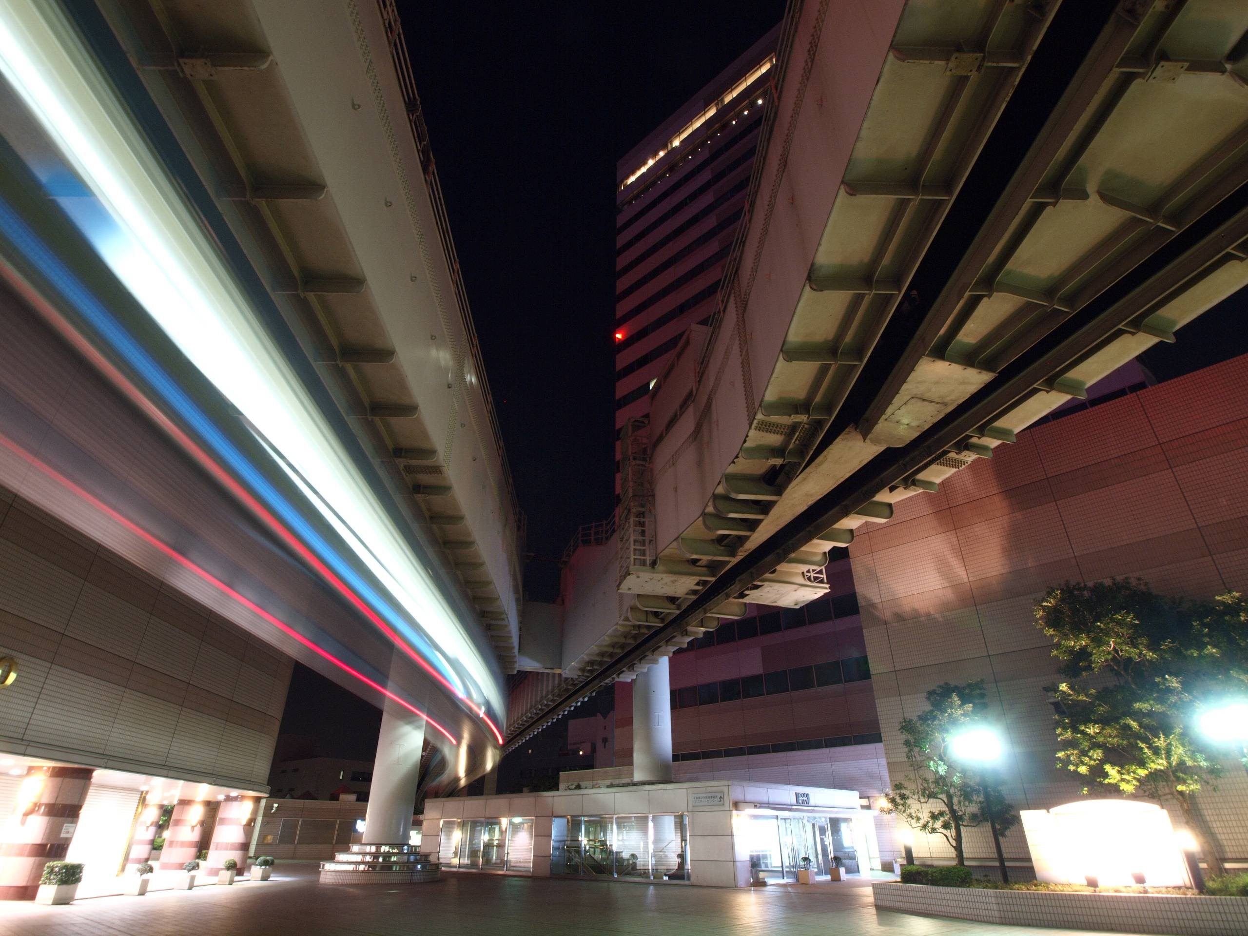 千葉都市モノレール